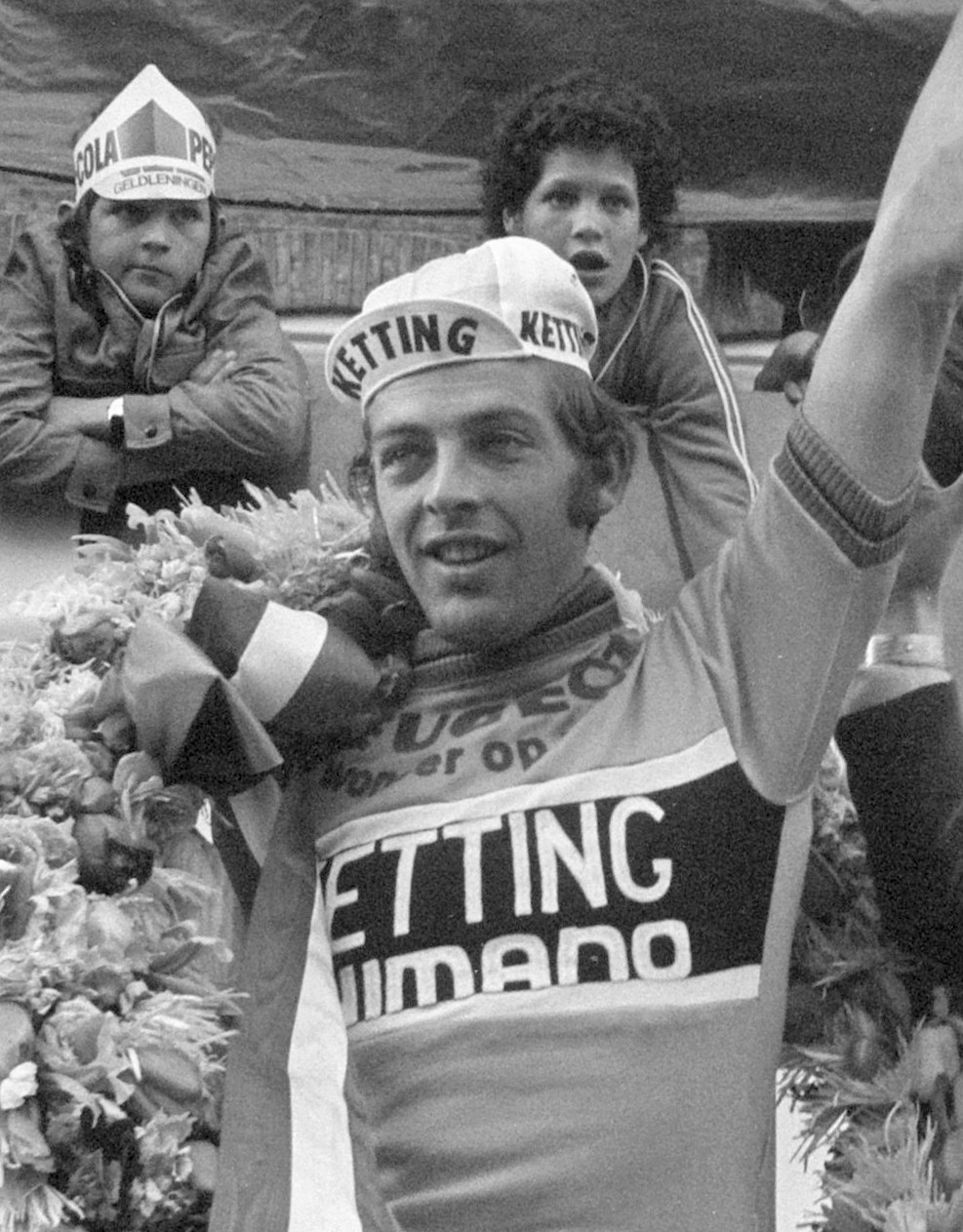 Olympias toer door Nederland, rondewinnaar Roy Schuiten in de bloemen